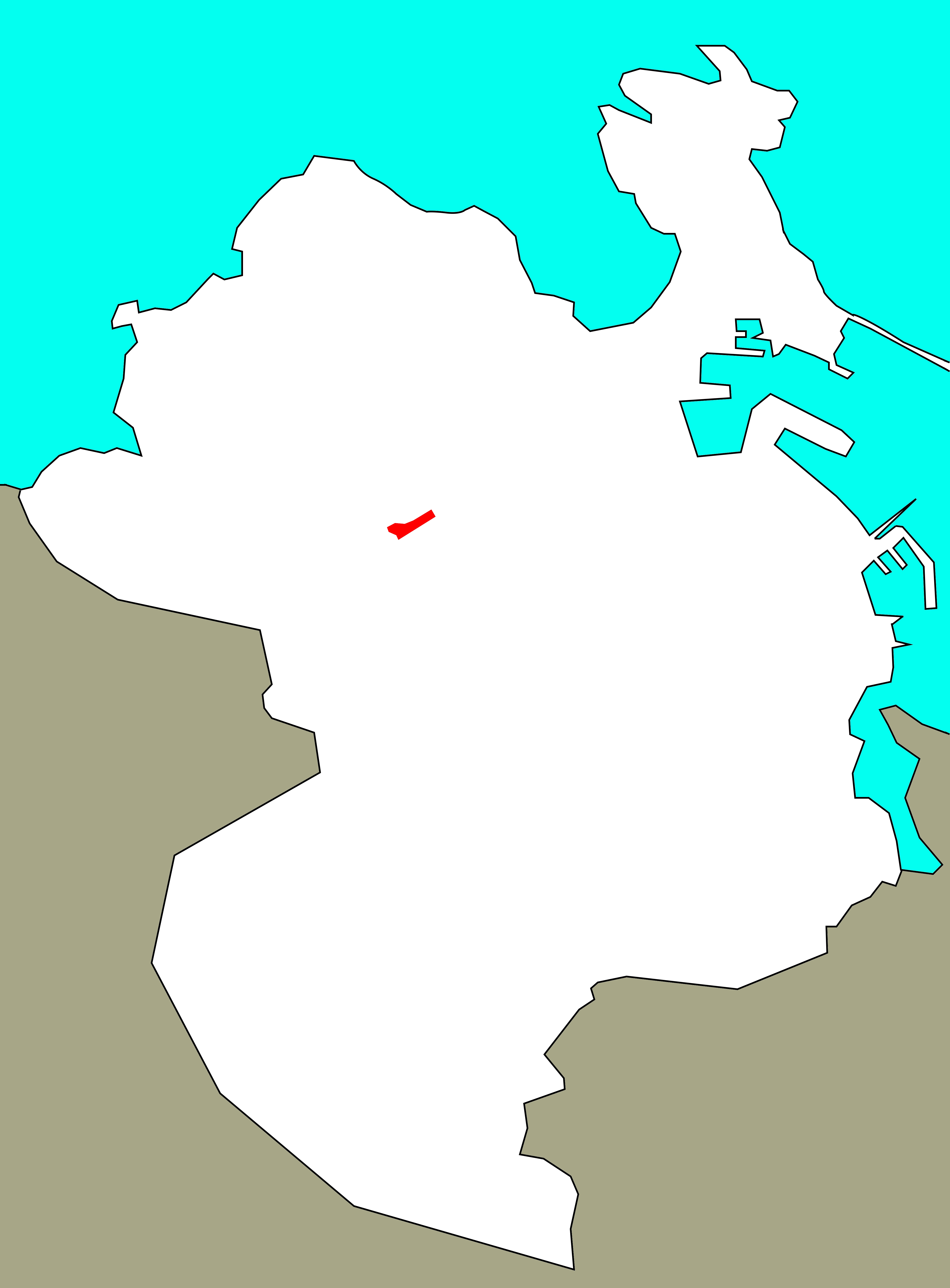 Situación de Fontenova no concello da Coruña.[1]